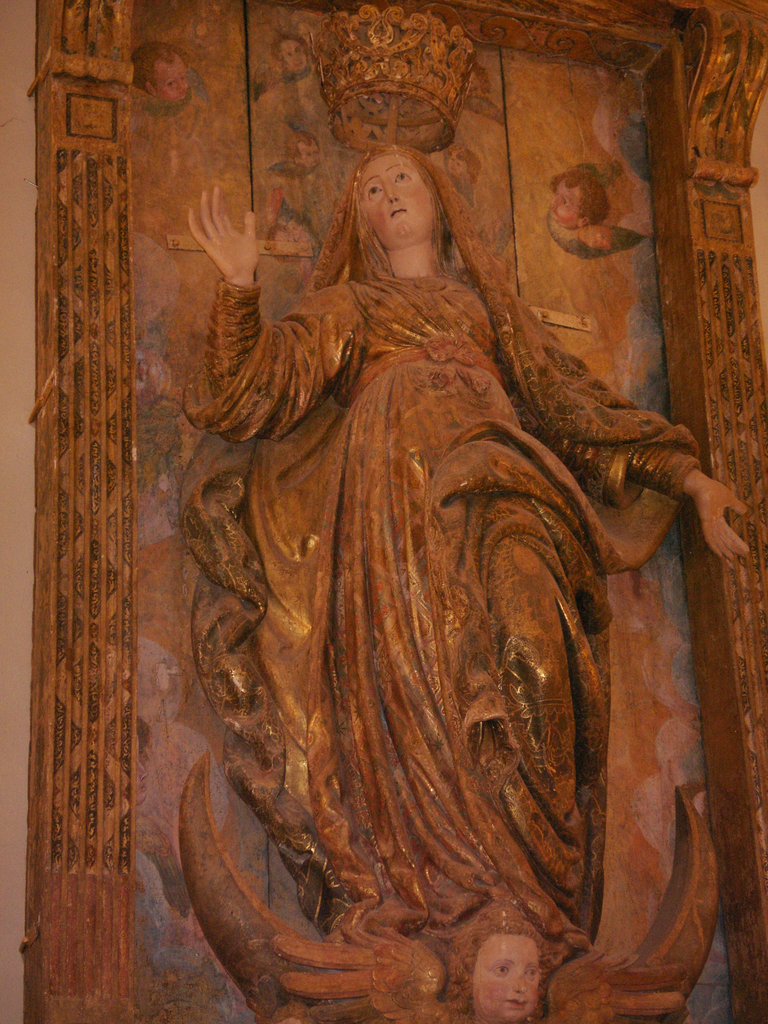 Virgen de los Ángeles de Lucas Mitata (s. XVI). Presidía el antiguo retablo de la Catedral de Coria. Hoy expuesta en el museo catedralicio.